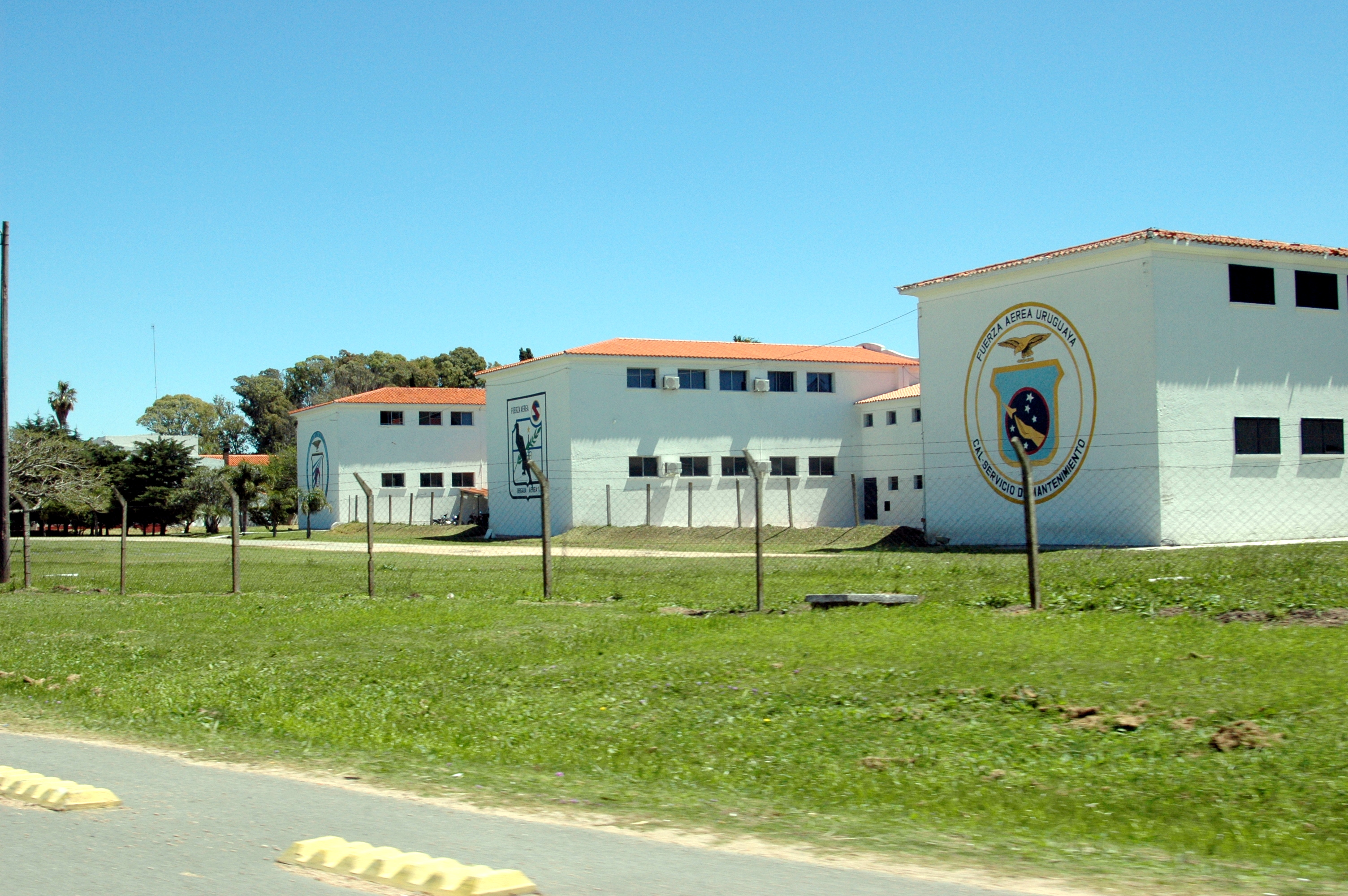 Fuerza Aerea Uruguaya Ruta 101